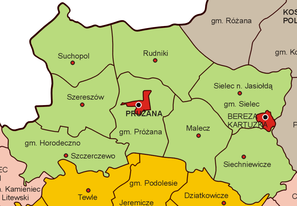 Пружанський повіт